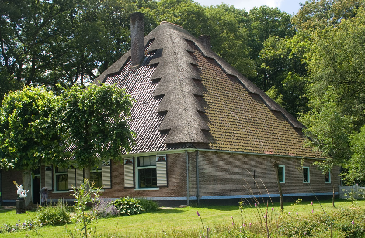 Stolpboerderij. Zuidscharwoude, 4.1 031Stolpboerderij(zuidscharwoude)